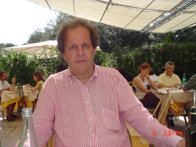 Michaël Zeeman op het terras van het museum voor moderne kunst in Rome.